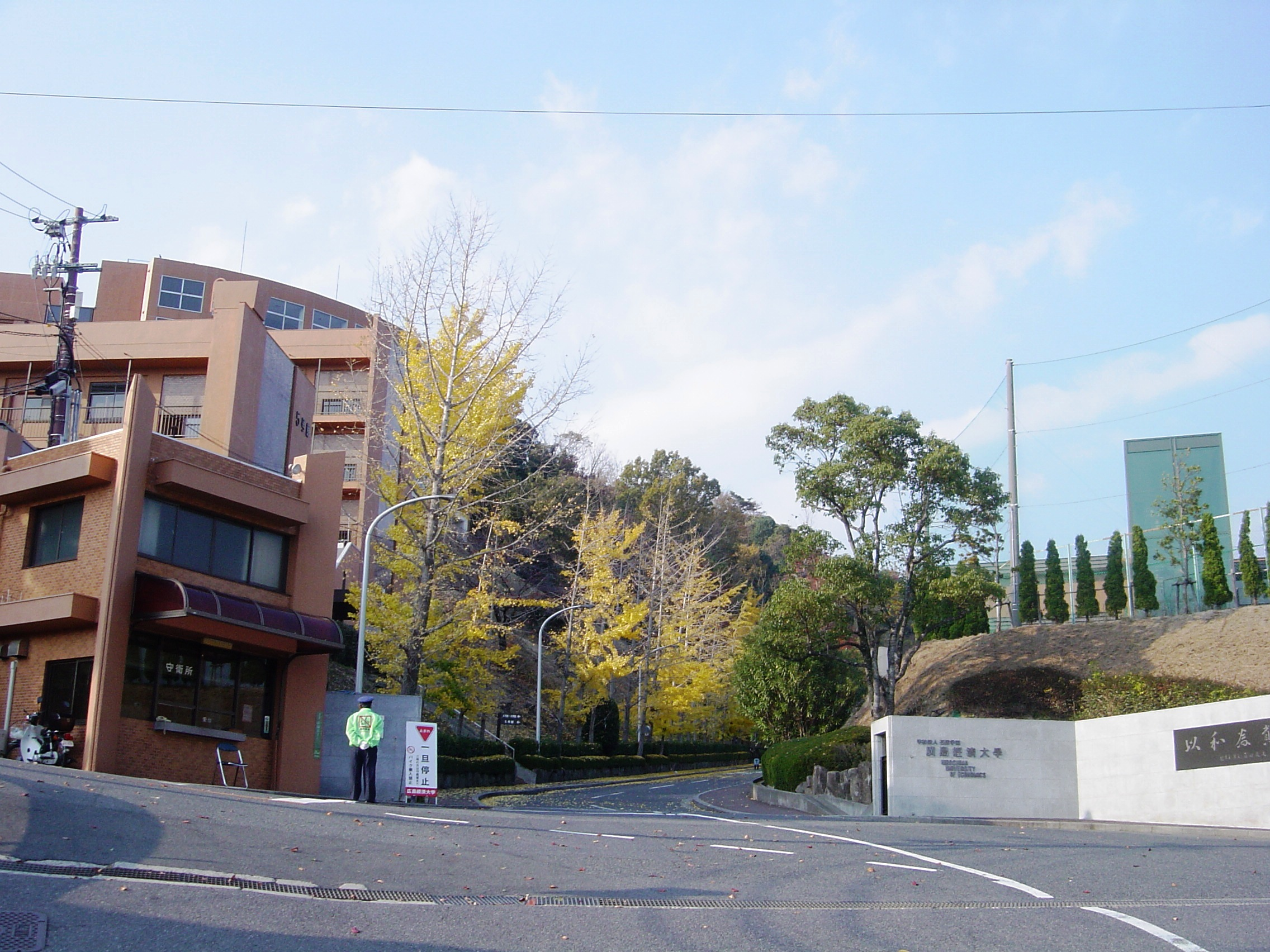 広島経済大学